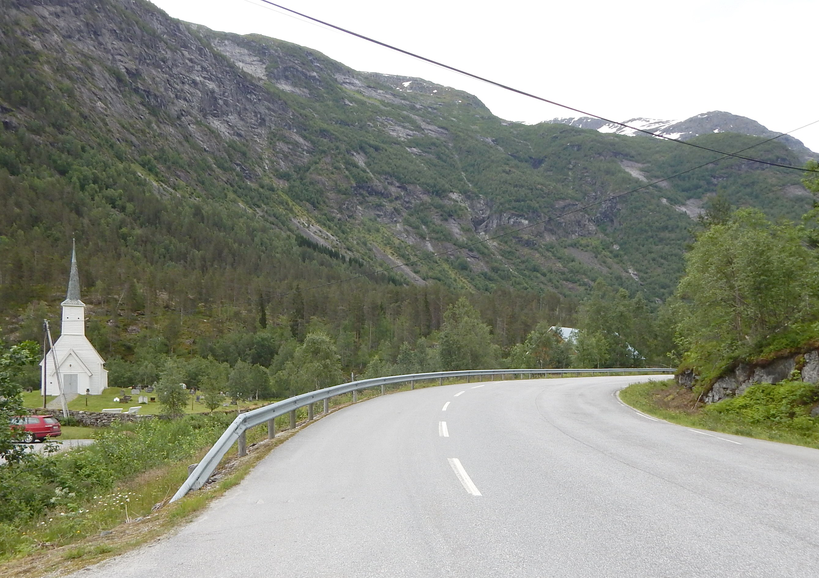 Primær fylkesvei 604 forbi Jostedal kirke